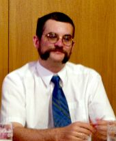 Paul Belien